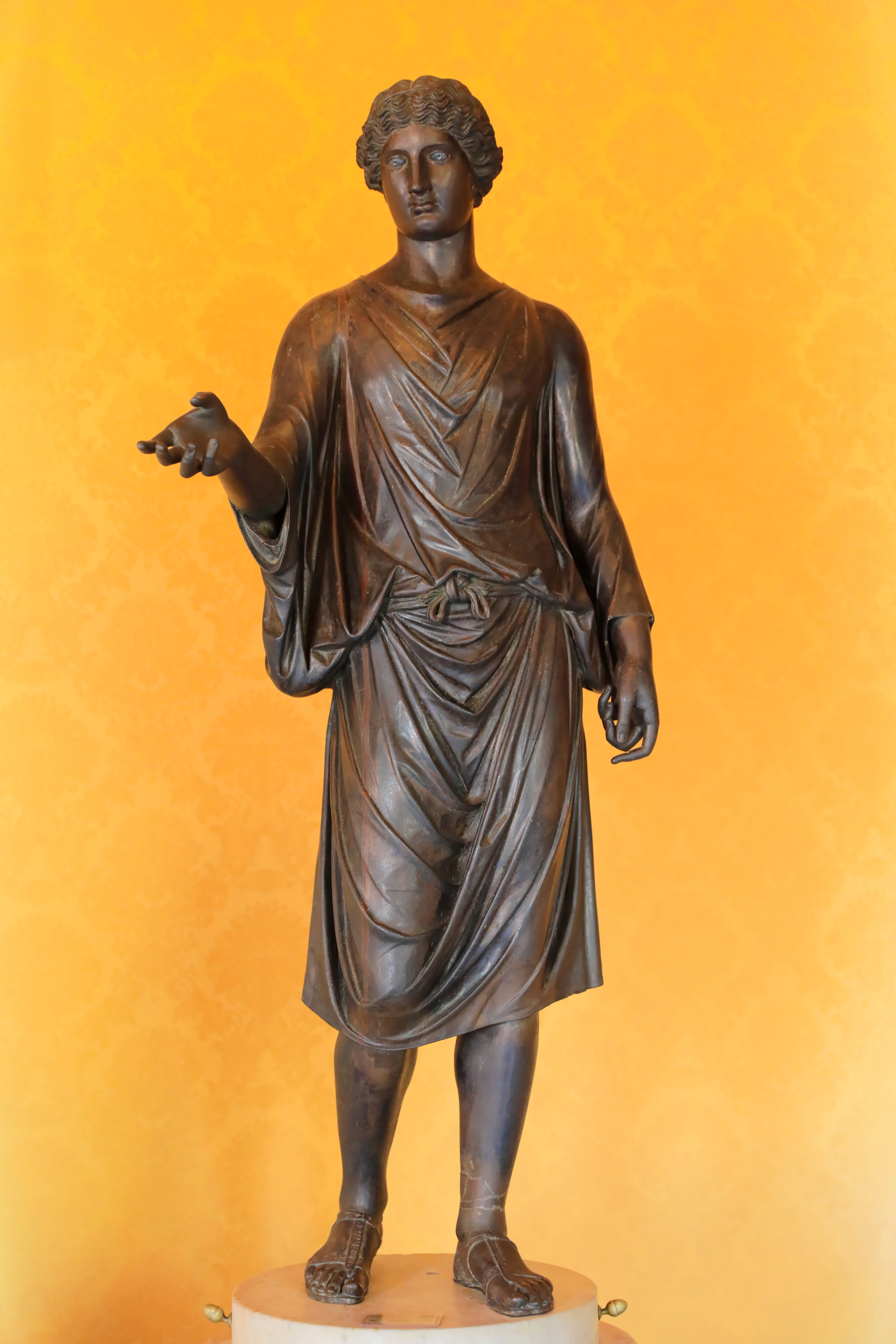 Camillus, Skulptur aus dem 1st century AD Bronze, cm 141 Acquisition data: Formerly at the Lateran. Sixtus IV donation (1471)